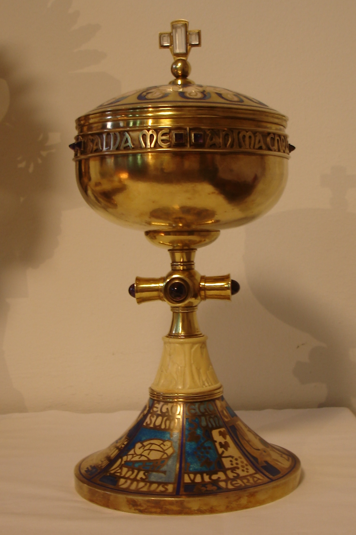 Ziborium, gefertigt vom Hamburger Metall- und Steinbildhauer Ernst Hanssen für die St.Franziskus Kirche in Hamburg-Barmbek-Nord